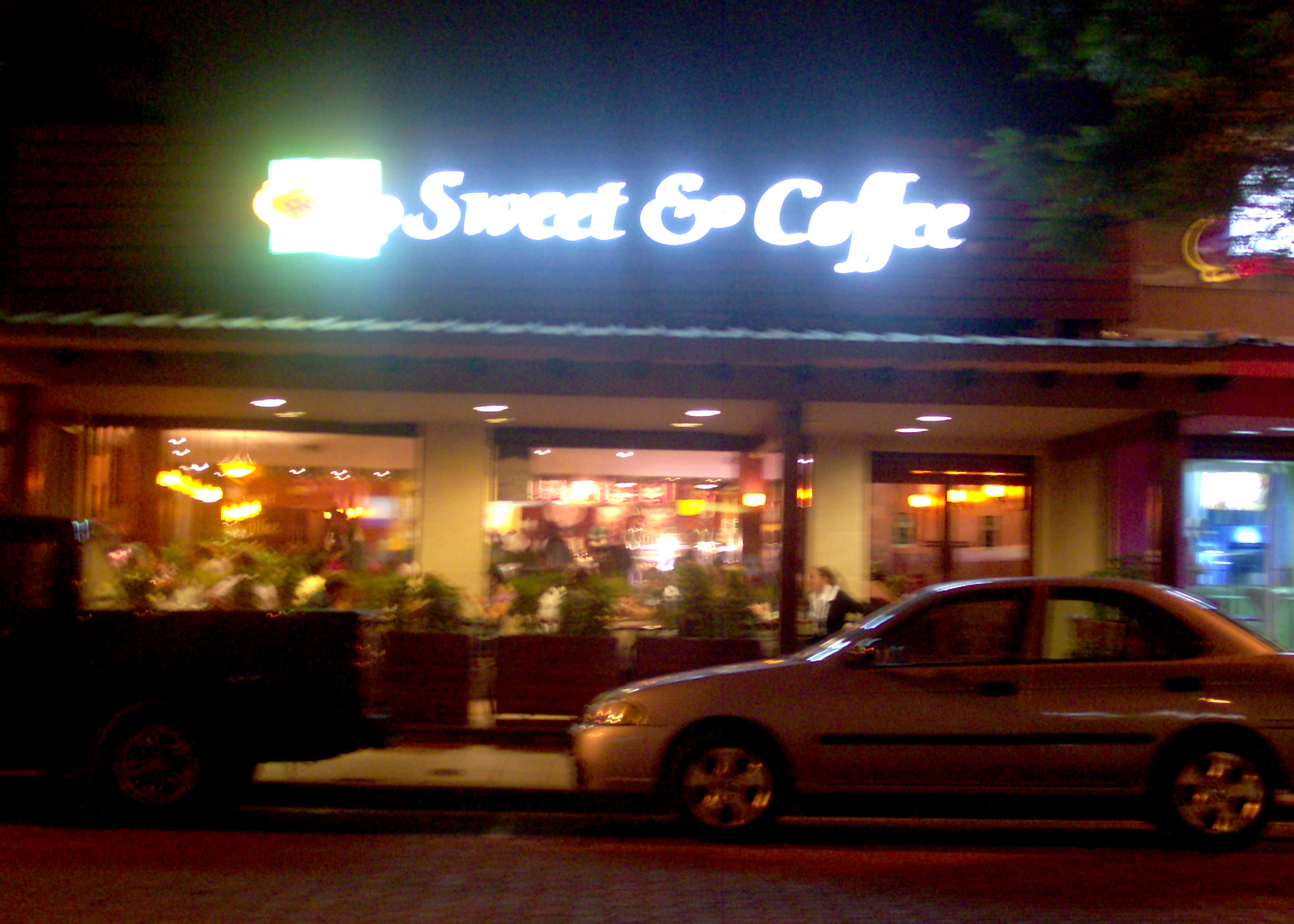 Cafeteria en el barrio de urdesa, Guayaquil, Ecuador